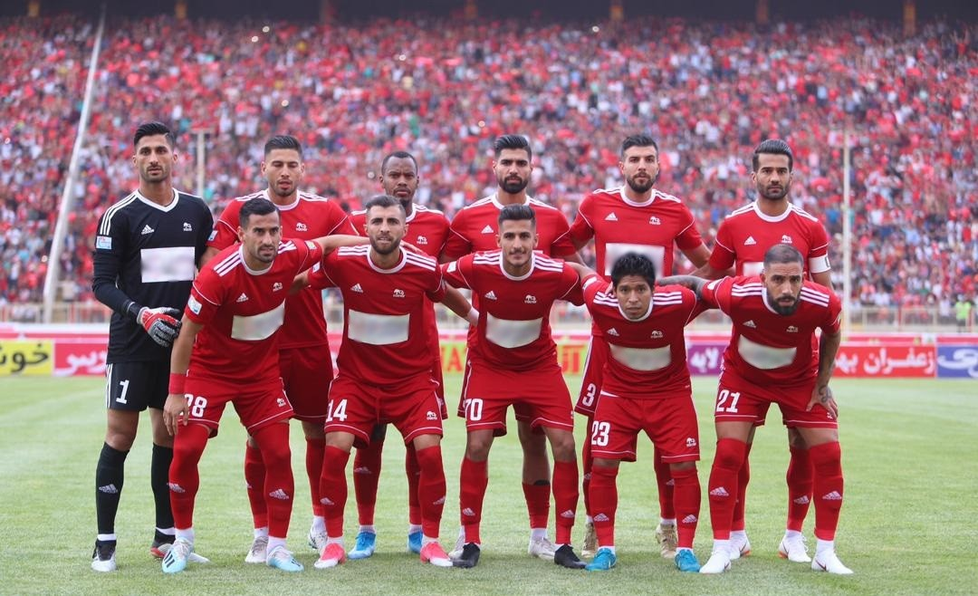 تراکتور سازی تبریز-دارای اندکی تغییر